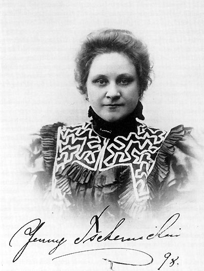 Jenny Tschernichin-Larsson